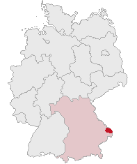 Landkreis Freyung-Grafenau, Bavaria, Germany